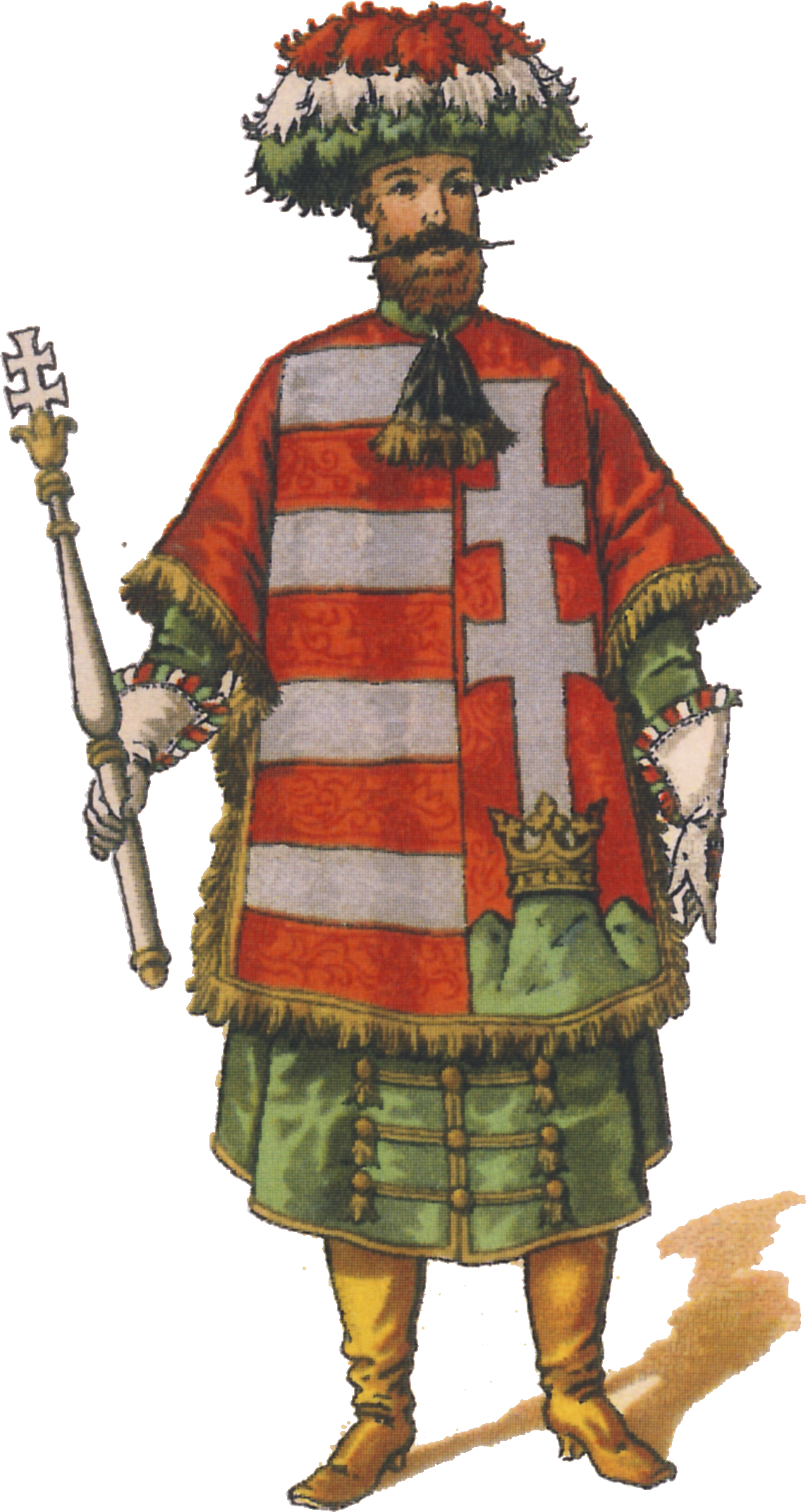 Ungarischer Herold.